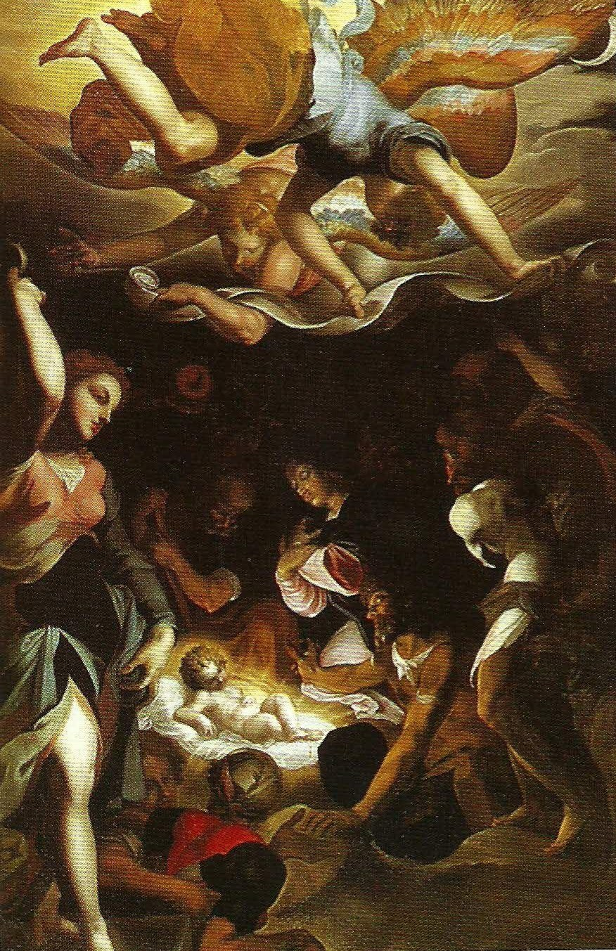 L'Adoration des Bergers, par Martin Fréminet, Gap, musée départemental. Provient de l'hospice du Montgenèvre.